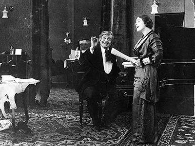 Photo de film